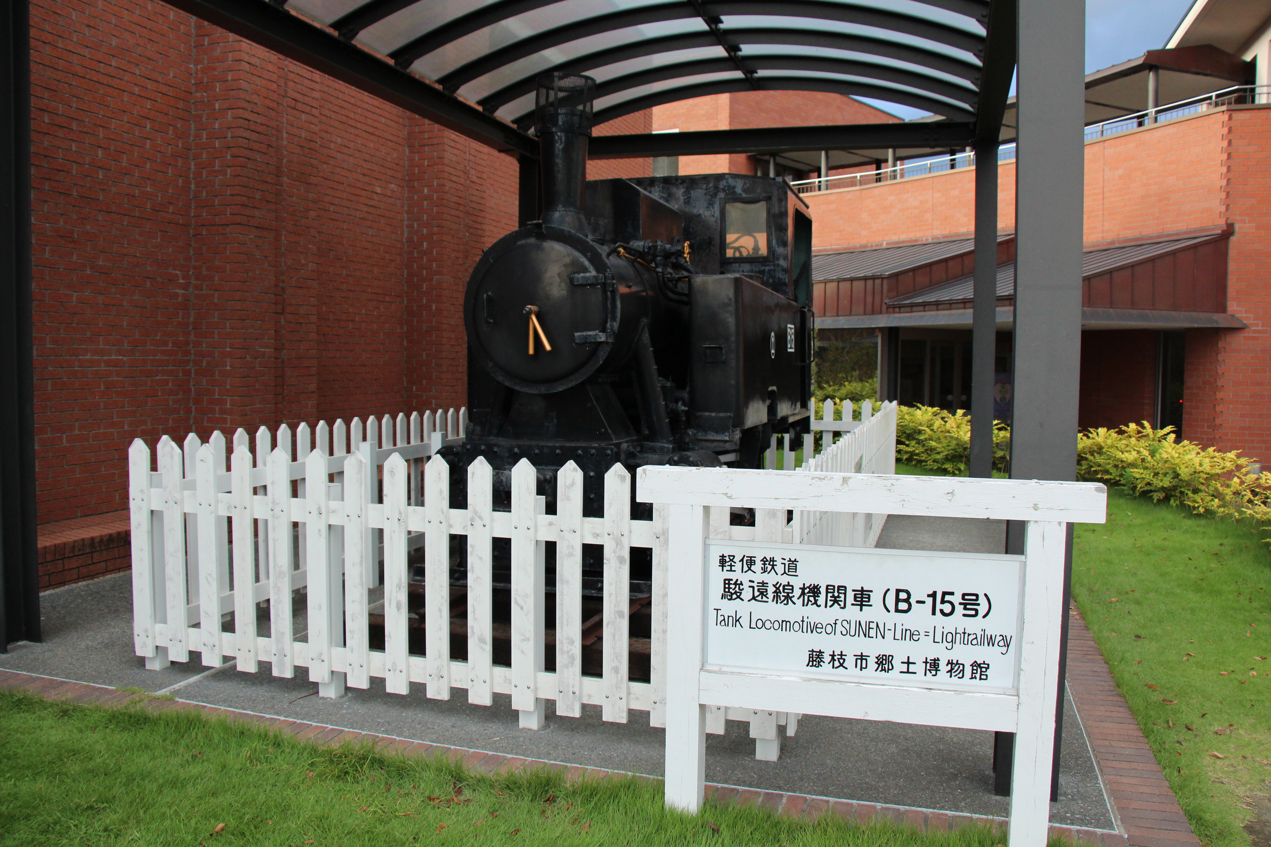 藤枝市郷土博物館敷地内に保存されている軽便鉄道である静岡鉄道駿遠線の機関車(B-15号)。前面から撮影。